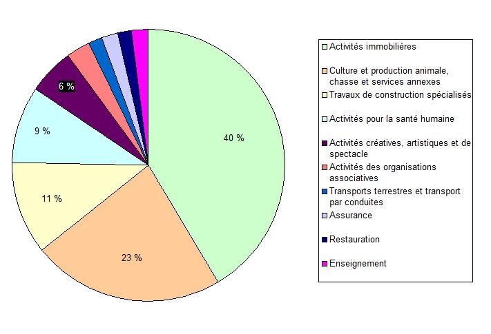 Répartition, en fonction du scteur d'activité, des entreprises de Guengat (Finistère, France).